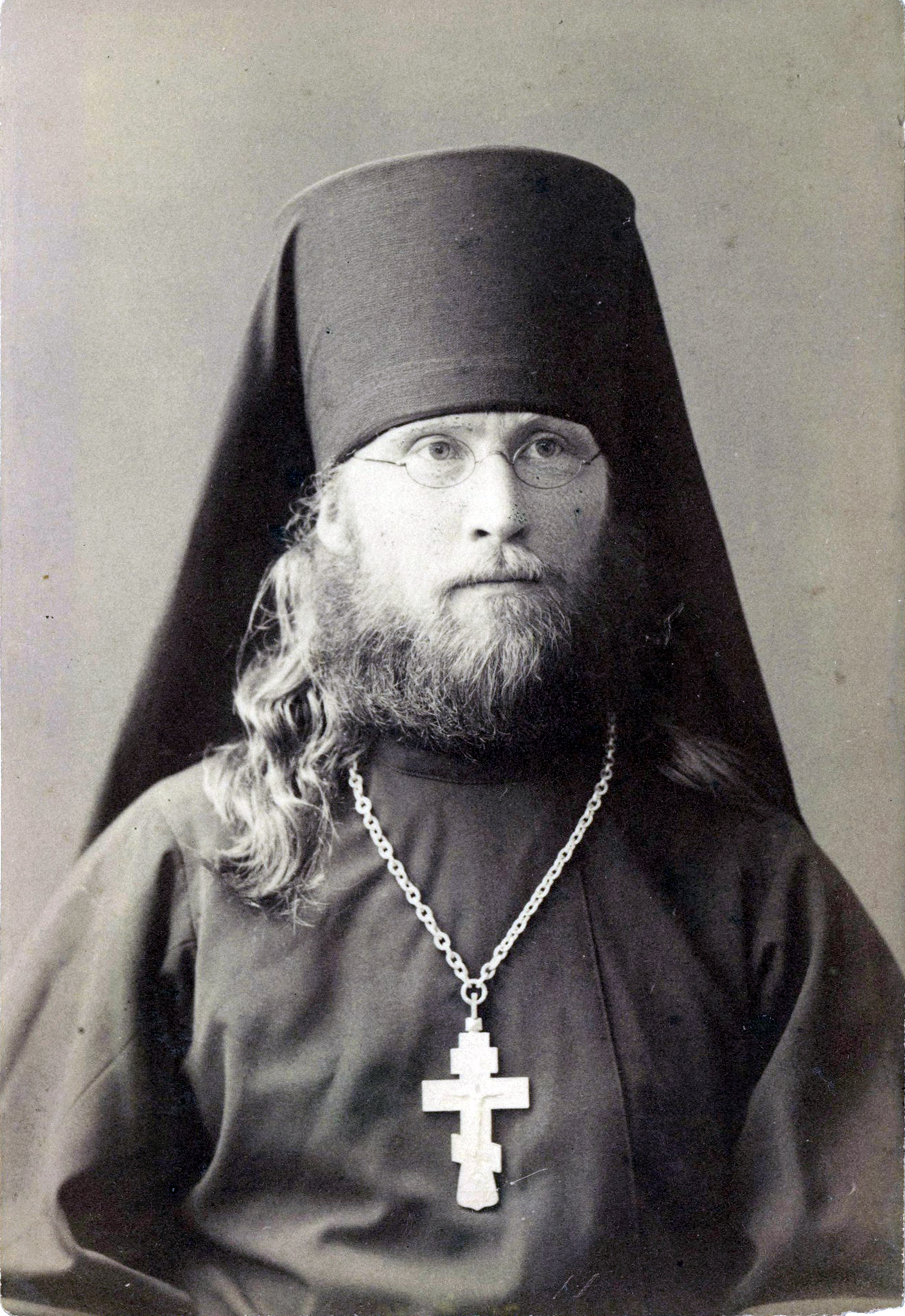 иеромонах Макарий (Павлов) в Казани